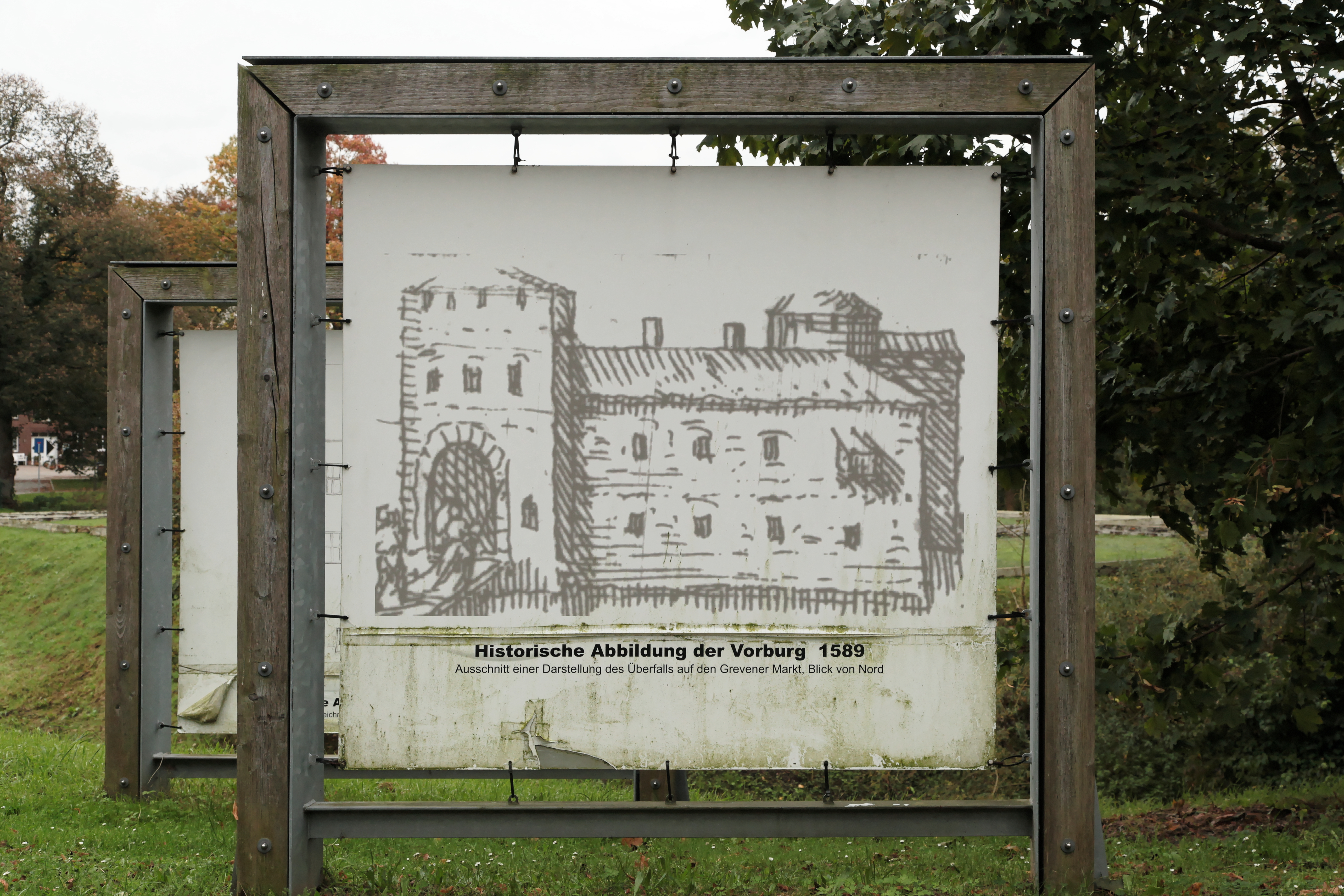 Burg Schöneflieth, Schöneflieth in Greven